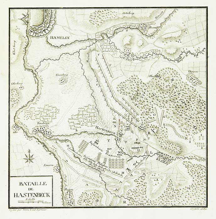 План битвы при Хастенбеке